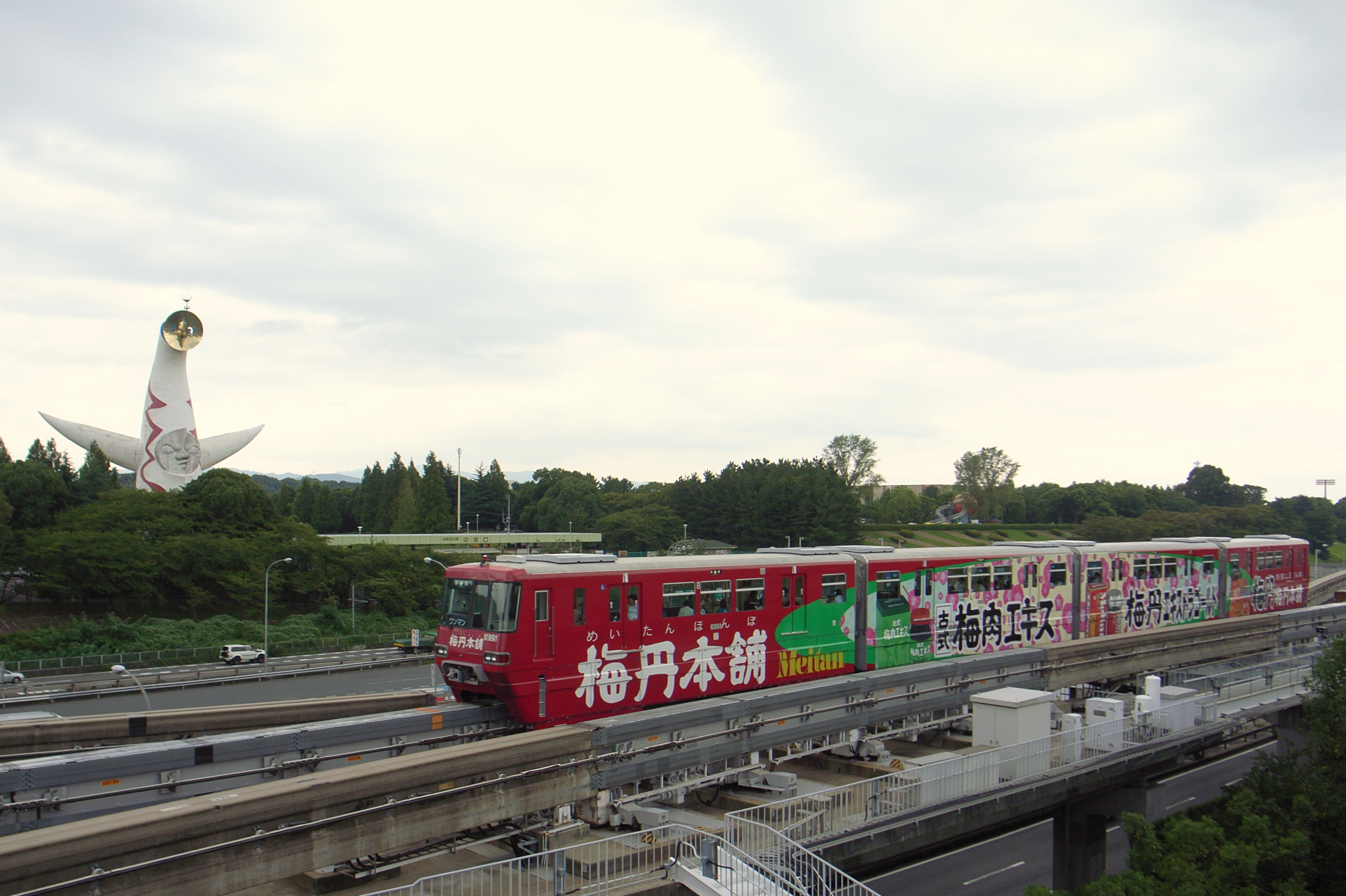 梅丹本舗